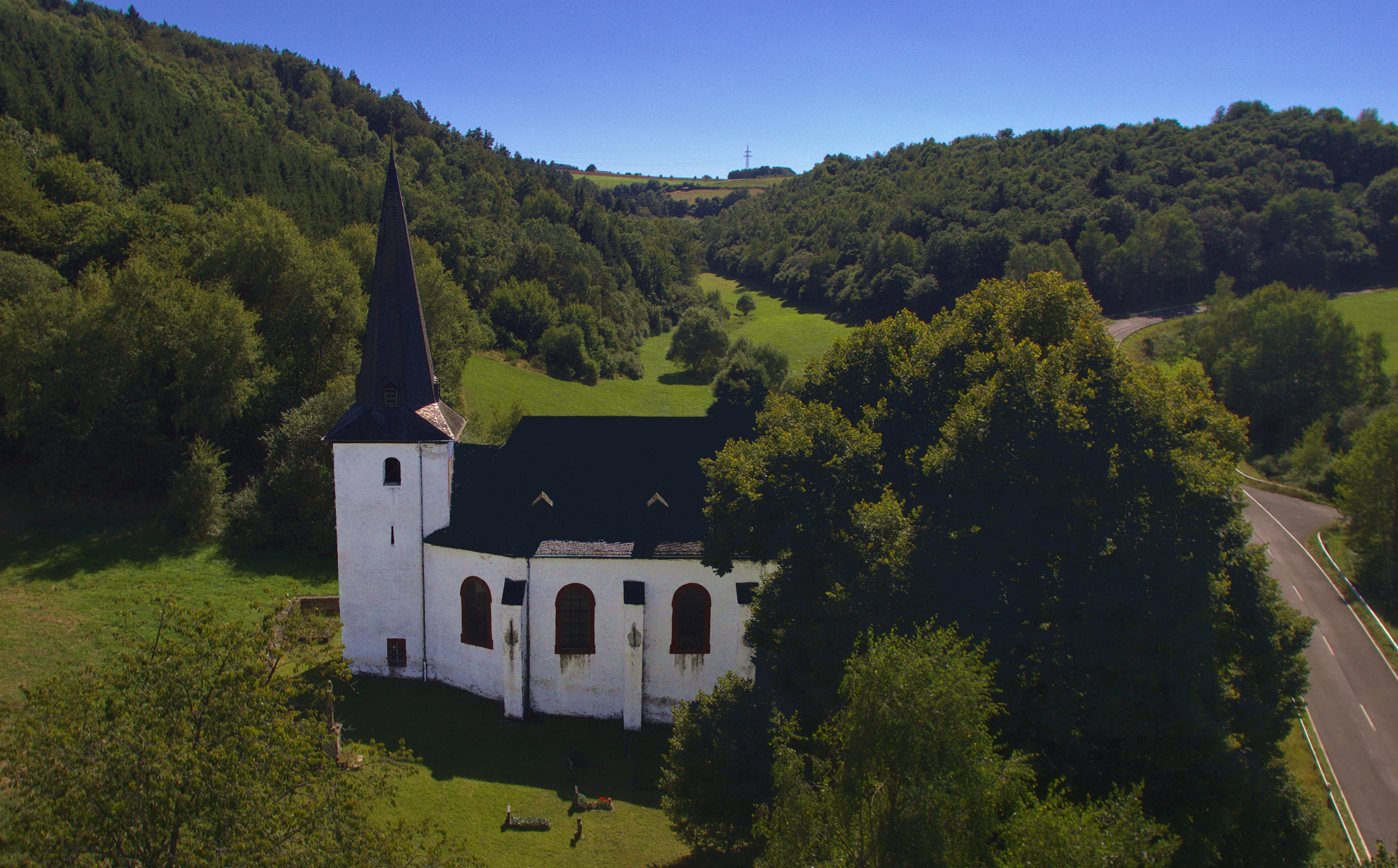 Die Walholzkirche bei Weiterath, Gemeinde Morbach - Bilck von Norden. Alleine in der Wiese stehende Kirche